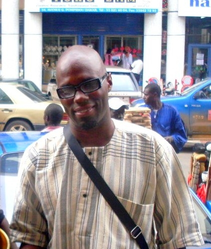 Kemi Seba à Dakar, devant les locaux de la radio Convergence FM, le jour de la signature de son contrat comme nouvel animateur.